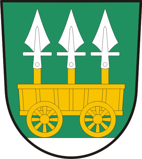 Bojiště